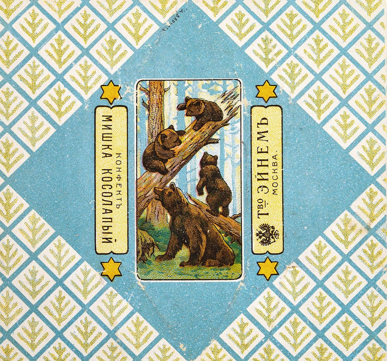 Этикетка конфеты «Мишка косолапый» производства Товарищества паровой фабрики шоколадных конфект и чайных печений «Эйнем»